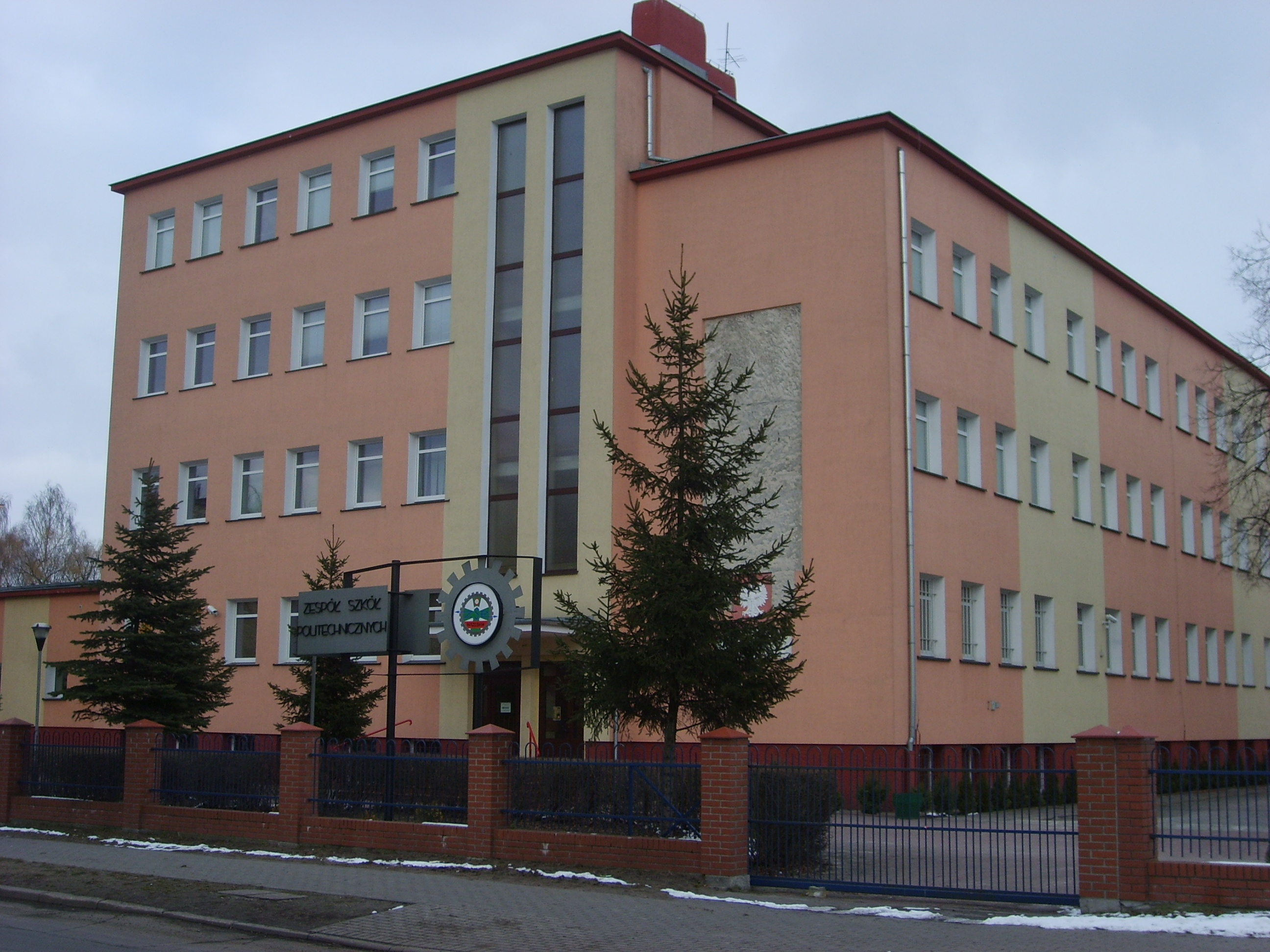 Zespół szkół politechnicznych im. bohaterów Monte Cassino we Wrześni